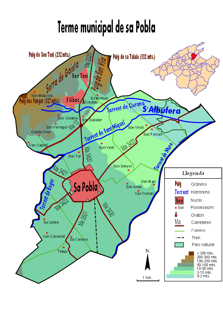 Actualització mapa topogràfic sintetic de sa Pobla